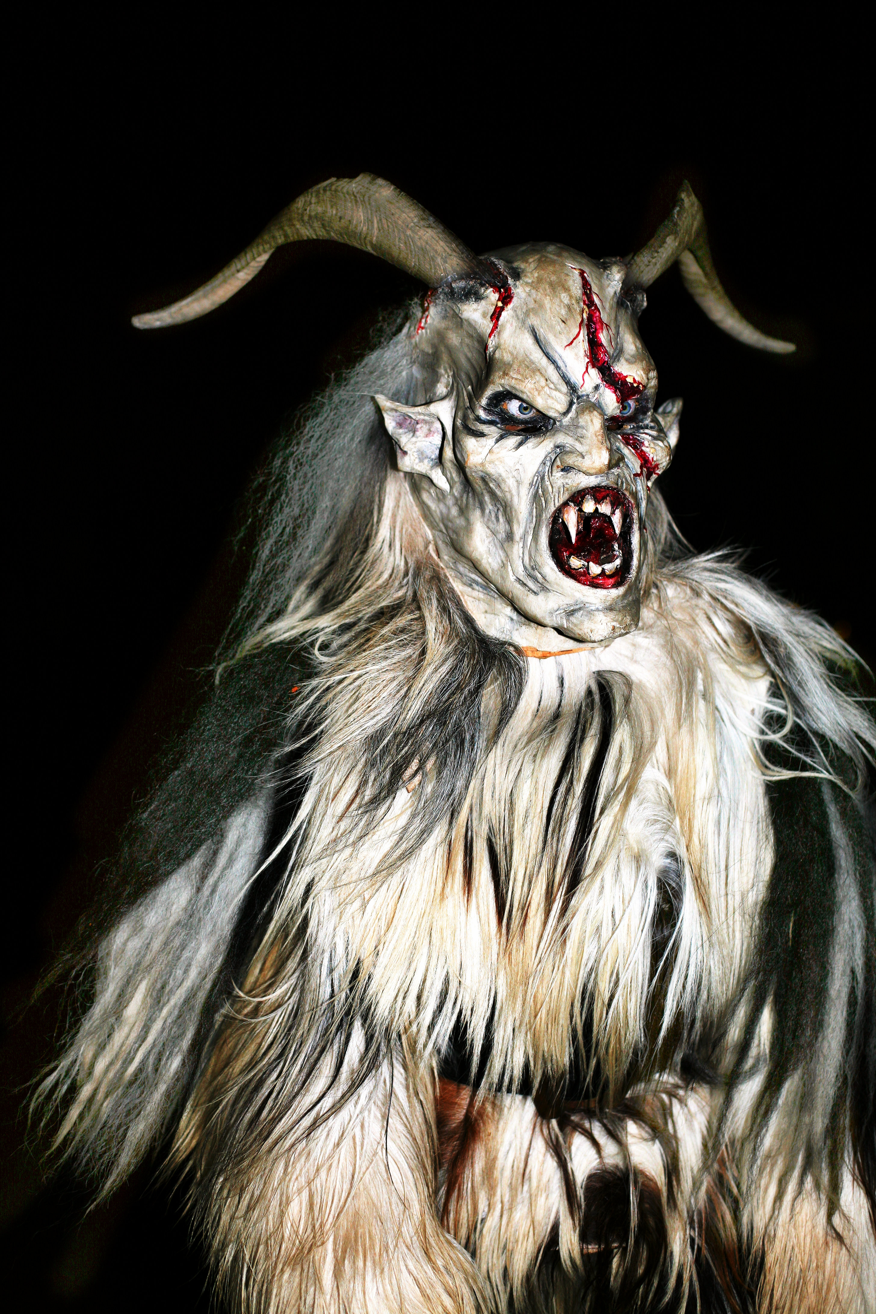 Krampus "Morzger Pass" Salzburg 2008